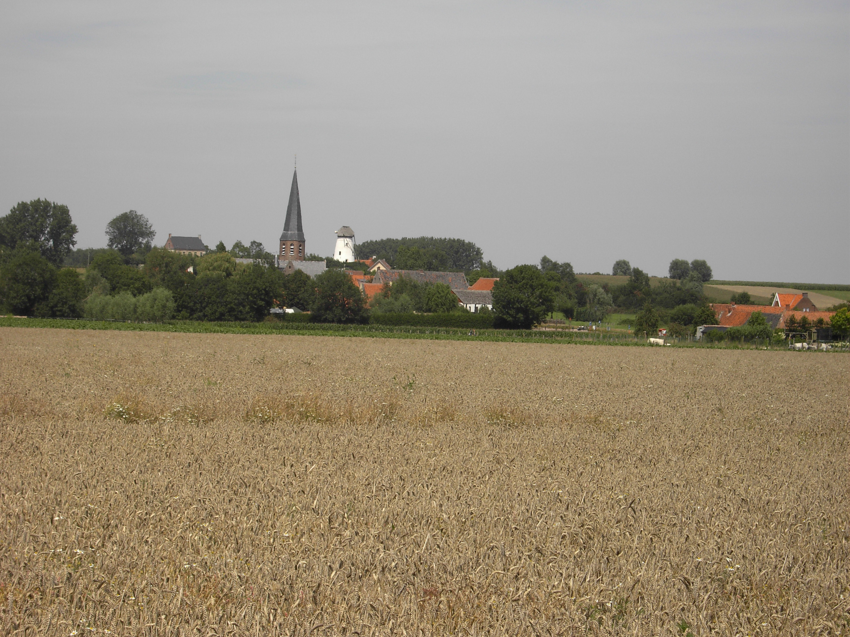 Baaigem (Gavere)